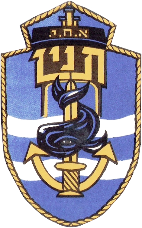 סמלי אוניות חיל הים